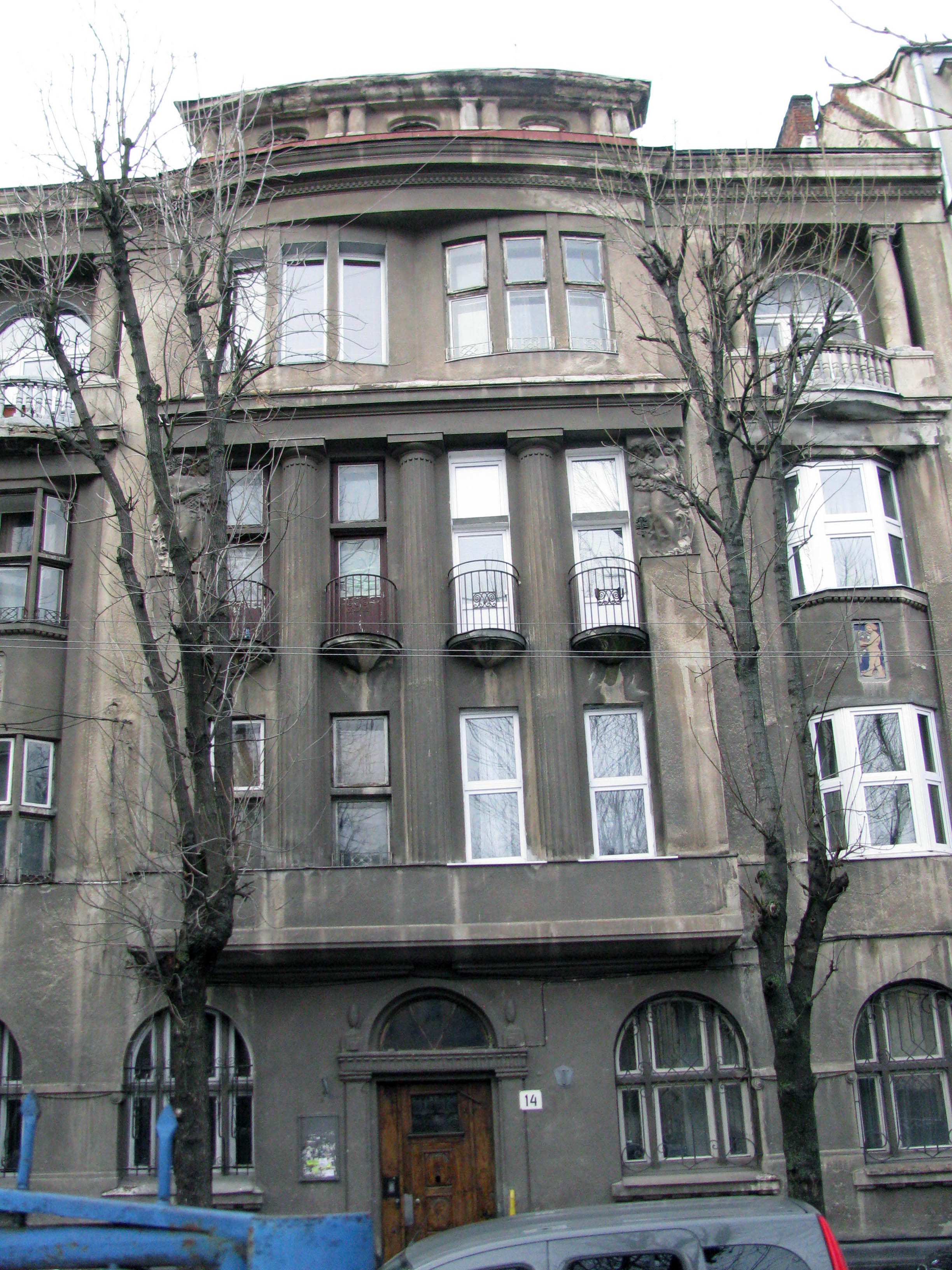 1=Житловий будинок на вулиці Конопницької, 14 у Львові. Архітектор Юзеф Авін (1883 — 1942 (1943)).